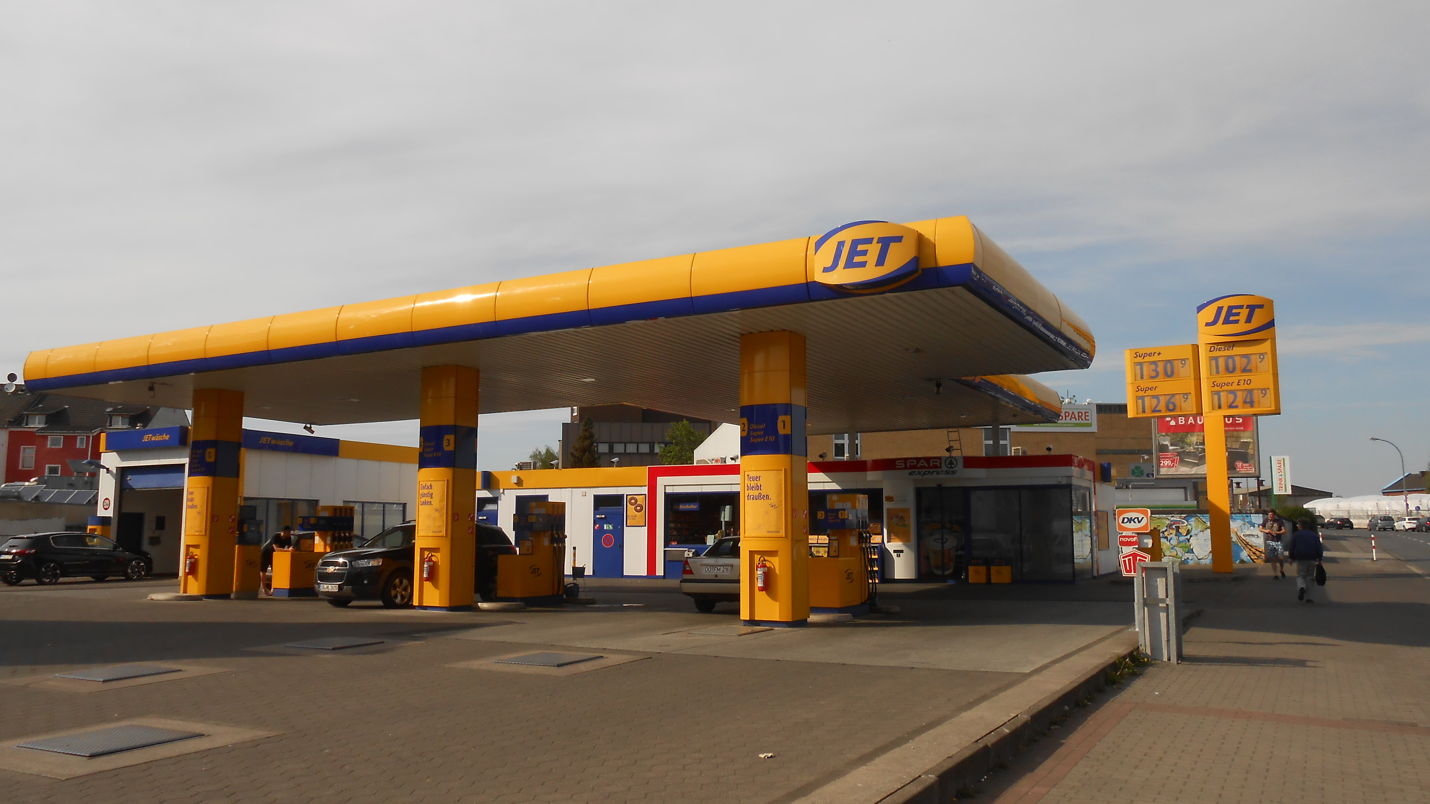 Eine Jet Tankstelle in Dortmund (Im Spähenfelde).